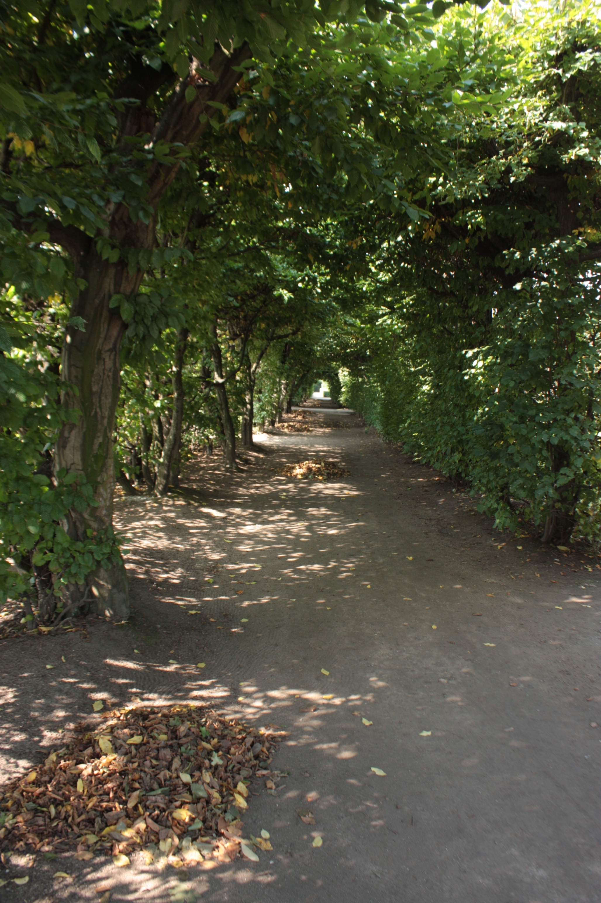 Živý plot , loubí, Kroměříž, Květná zahrada